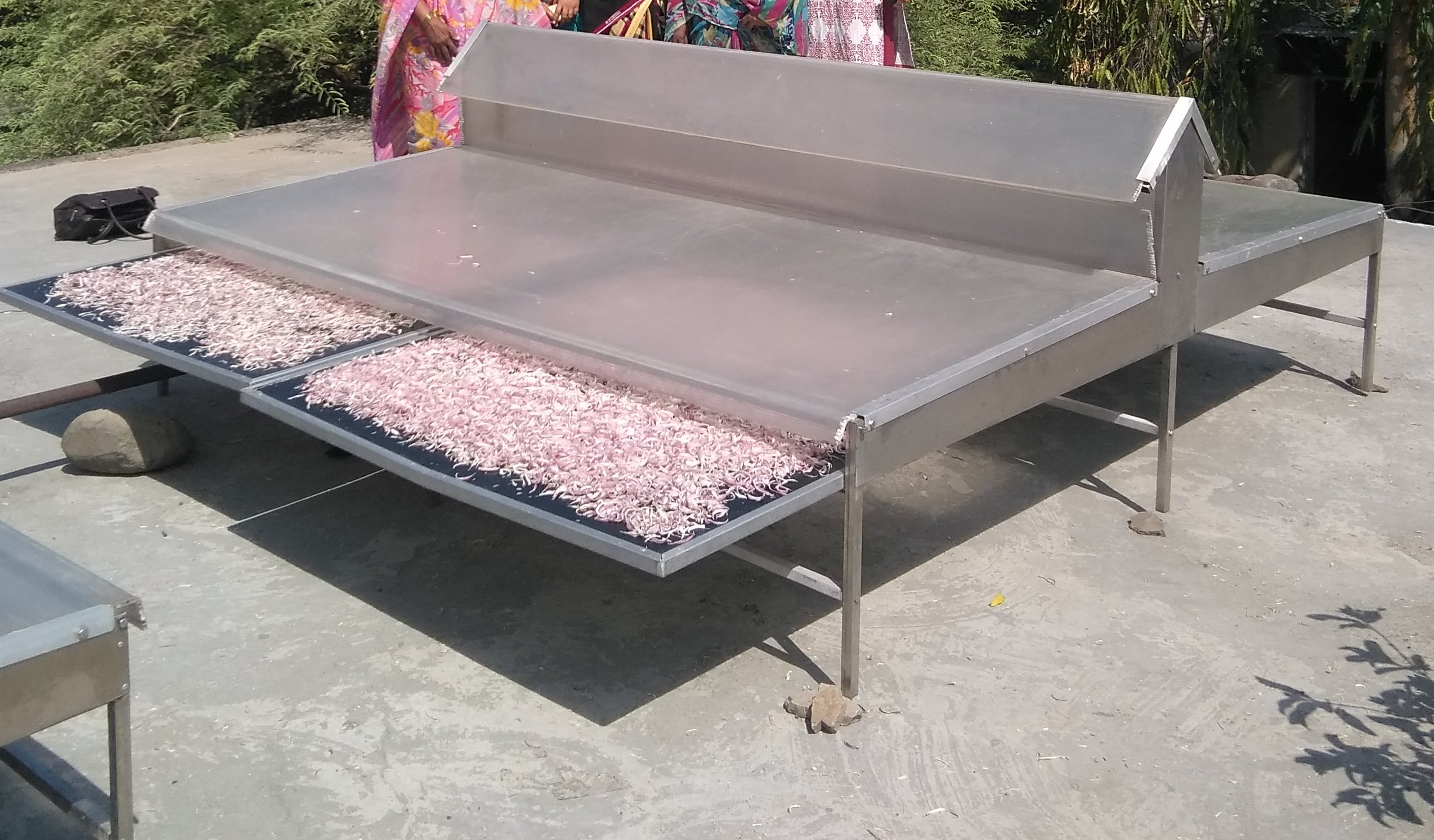 सोलर ड्रायर मध्ये कांदा वाळवताना